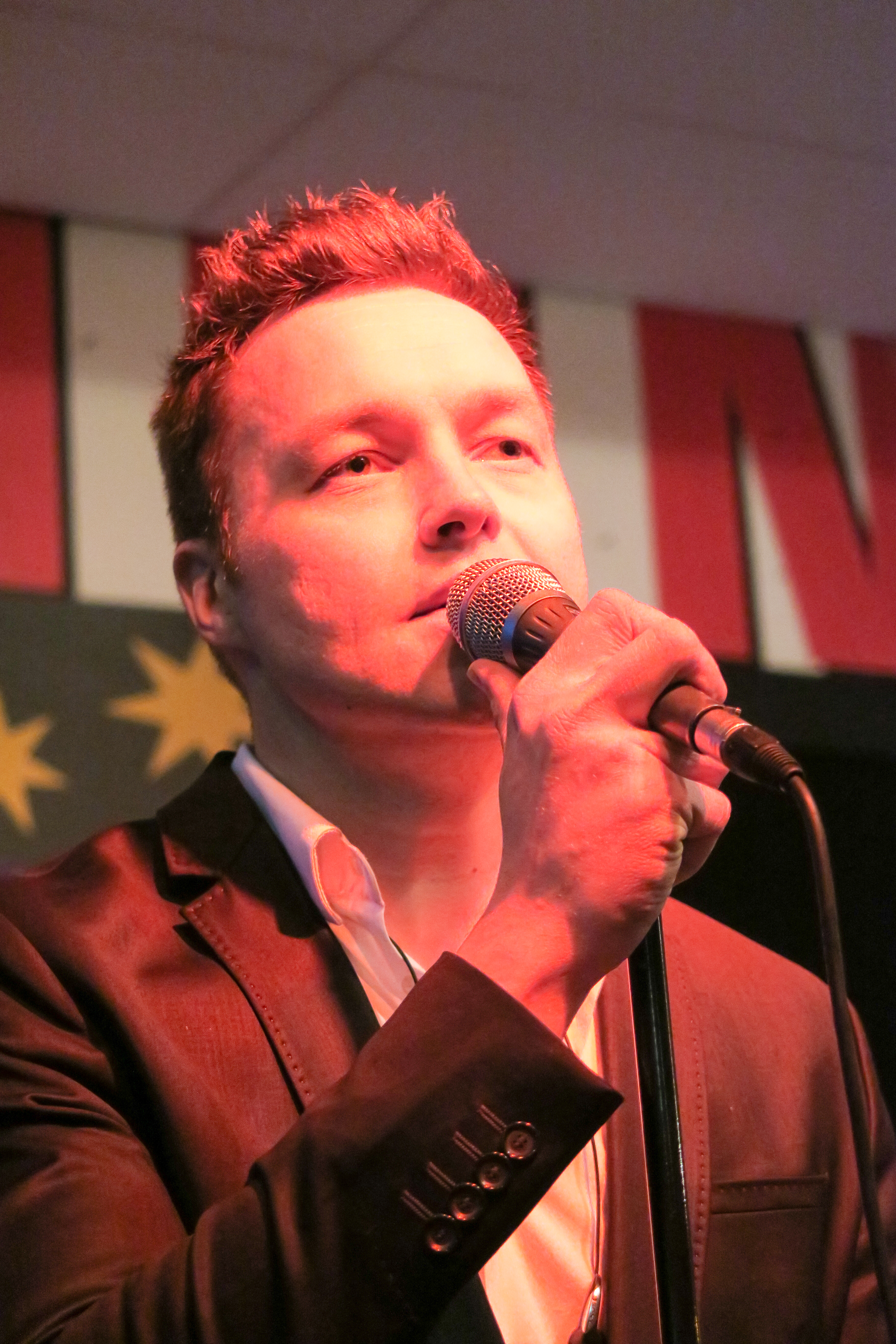 Antti Raiski suomalainen laulaja